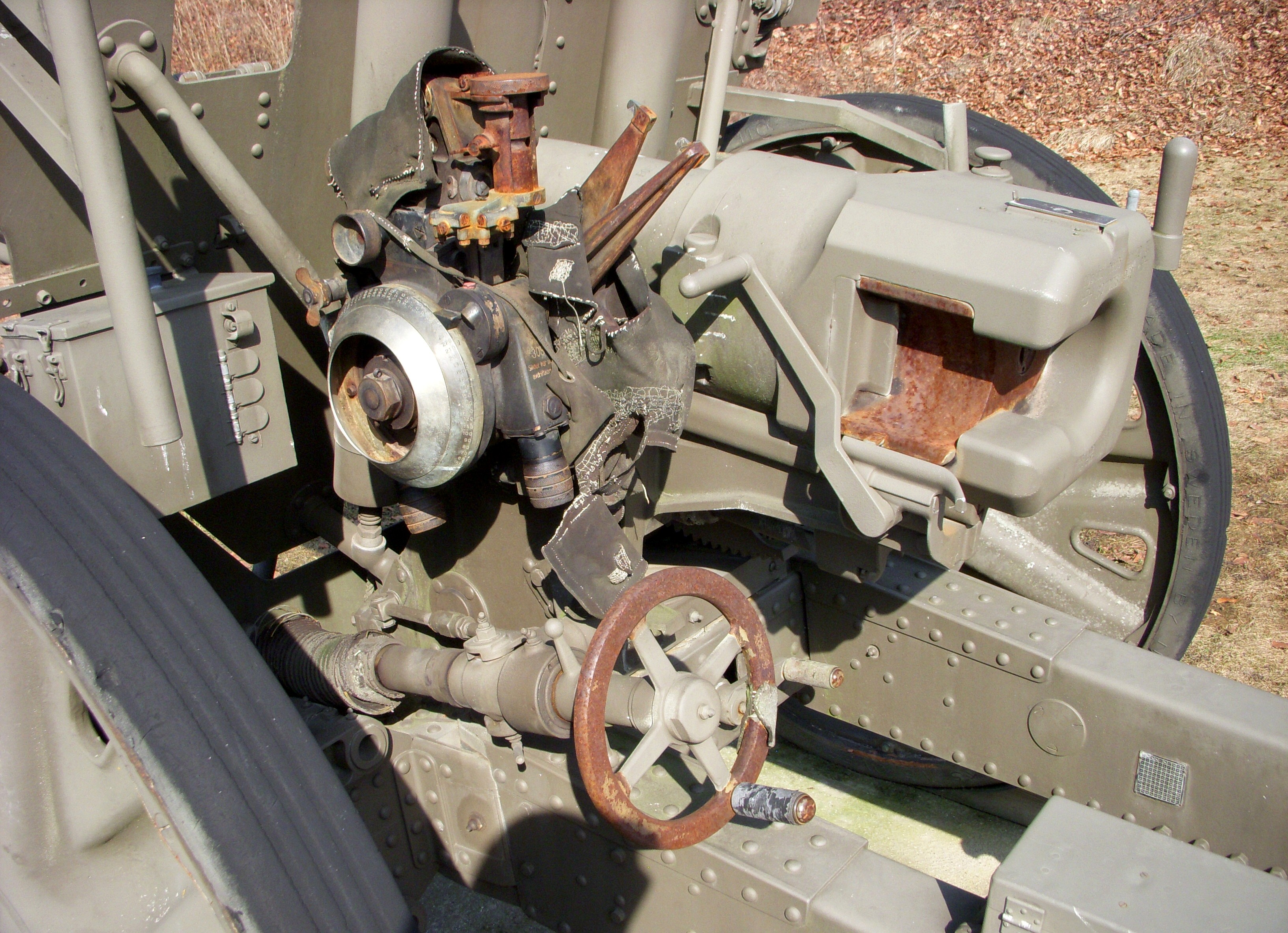 Haubits m/40 H (H = Holland) detalj